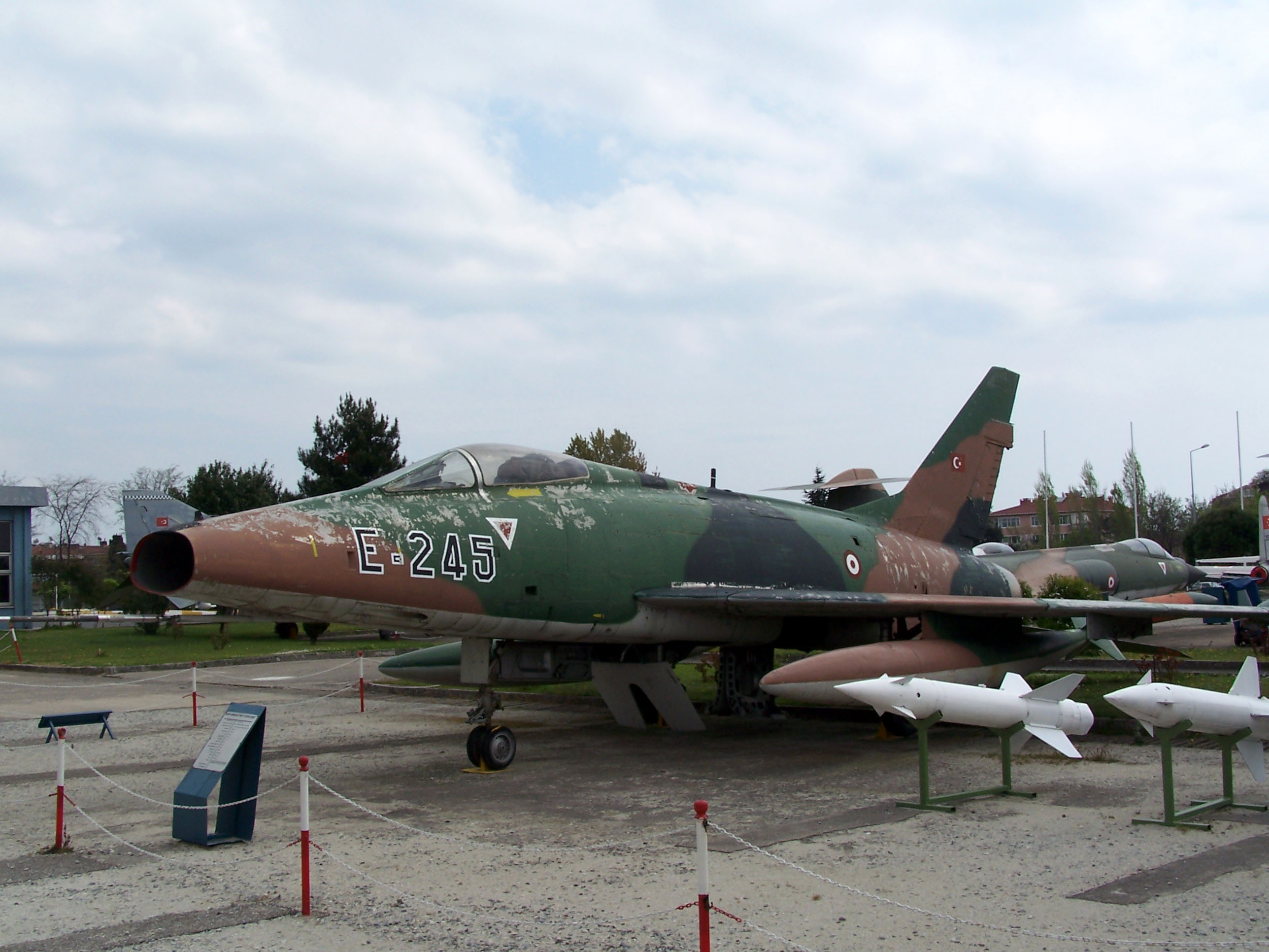 North American F-100 D Super Sabre in Istanbul Aviation Museum (İstanbul Havacılık Müzesi)